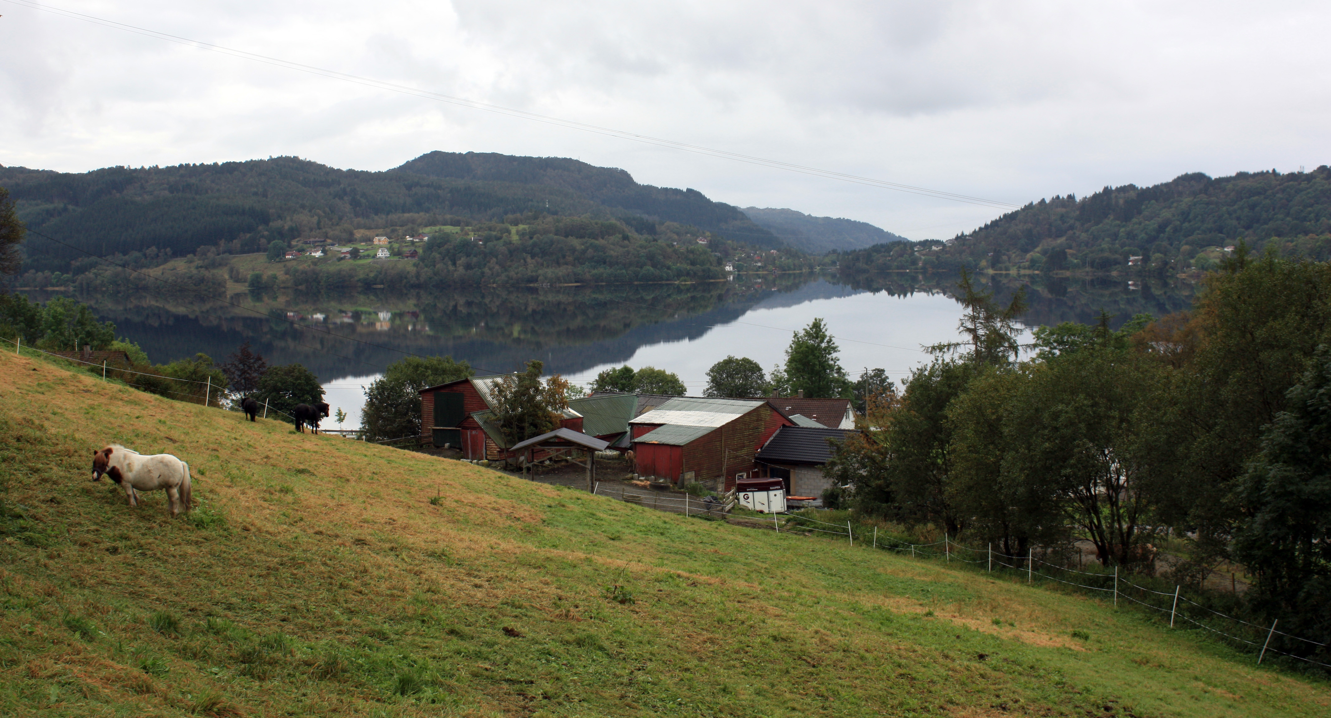 Nedre Sandven, Fana, Bergen.